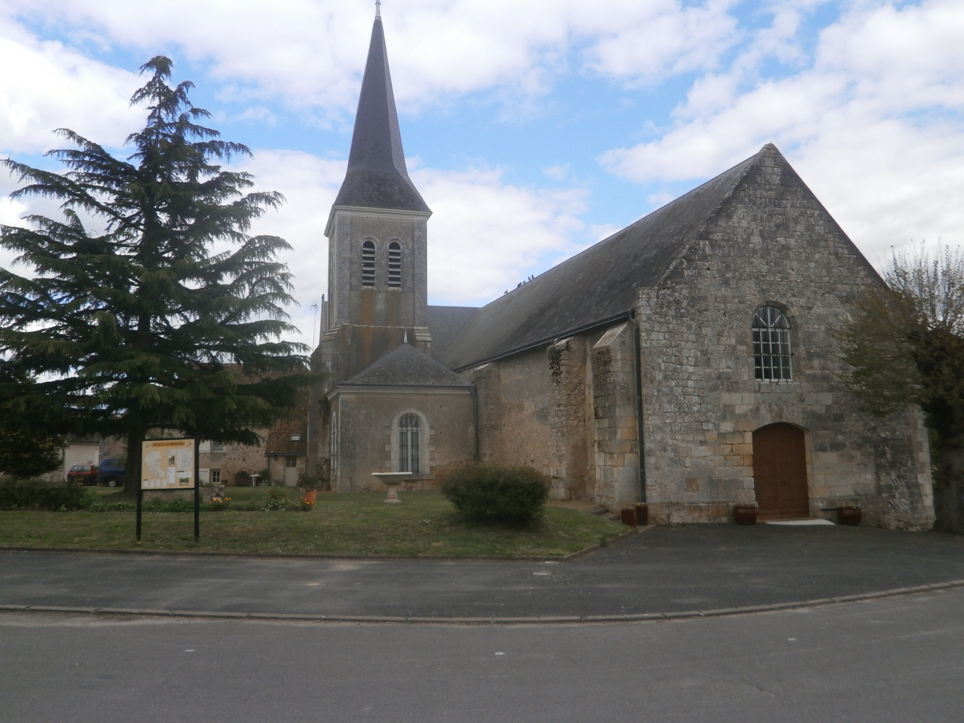 L'église de Neuilly-le-Brignon